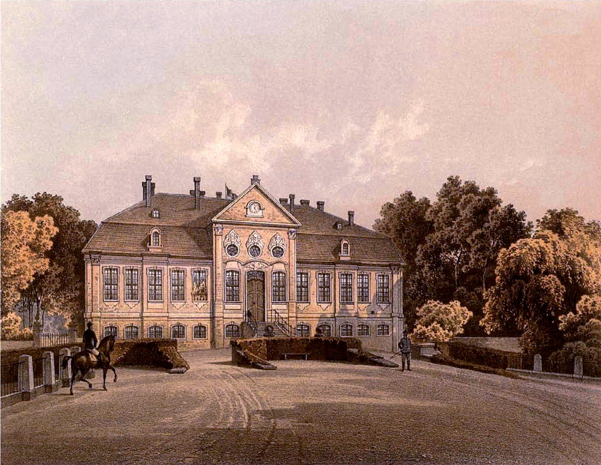 Schloss Königsborn, Kreis Jerichow I, Provinz Sachsen, Lithographie von Alexander Duncker